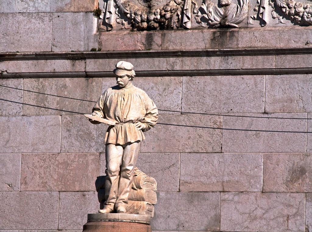 Schio, piazza Alessandro Rossi, monumento al Tessitore (L'Omo) This is a photo of a monument which is part of cultural heritage of Italy.